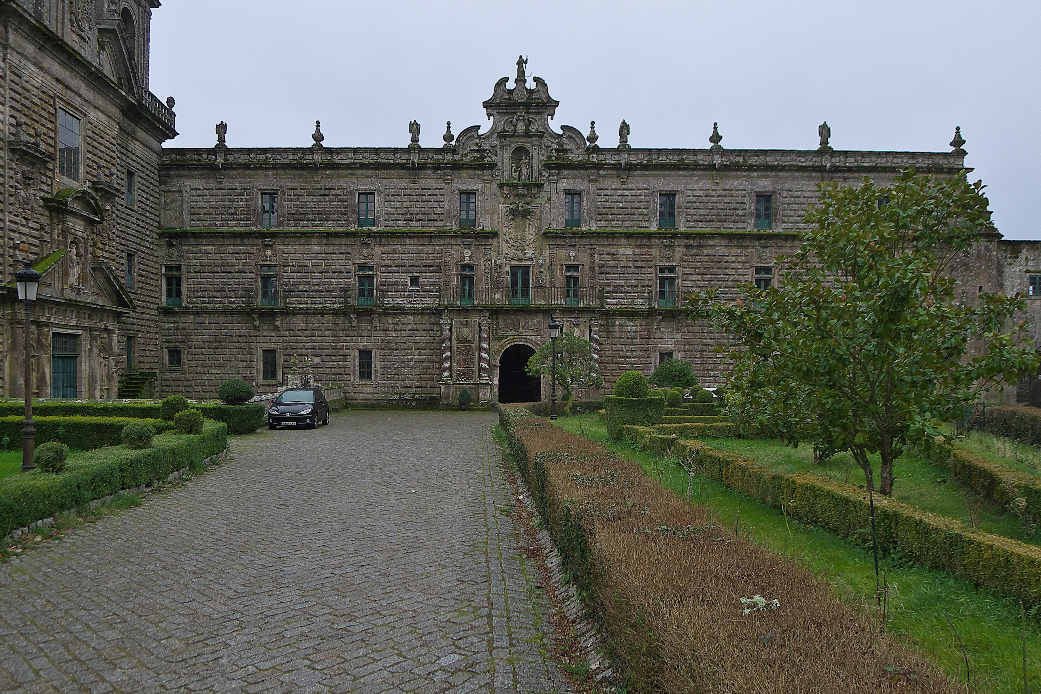 Francisco Castro Canseco diseña la fachada principal del monasterio en el primer cuarto del siglo XVIII